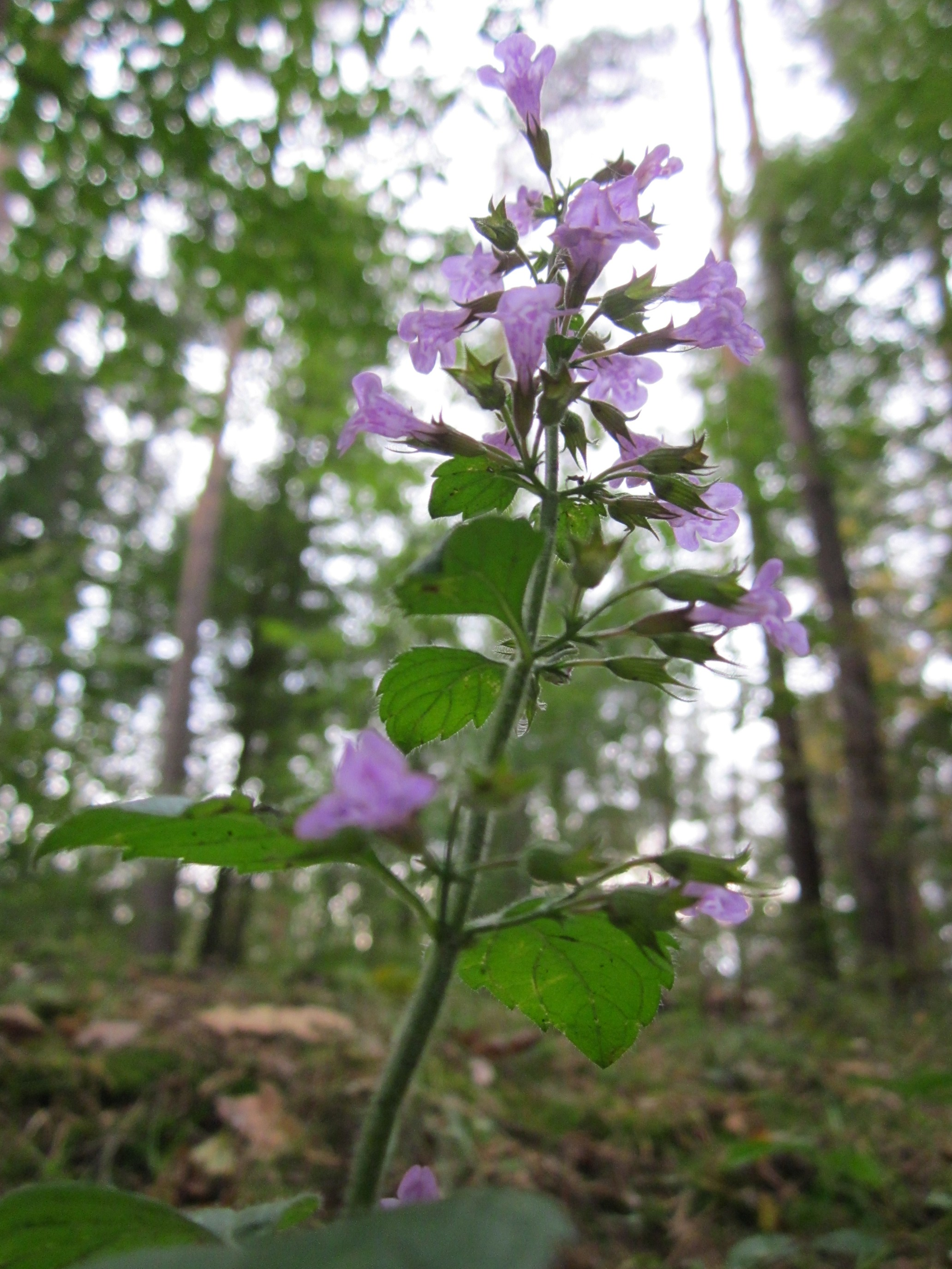 Wald-Bergminze (Calamintha sylvatica) im Schwetzinger Hardt